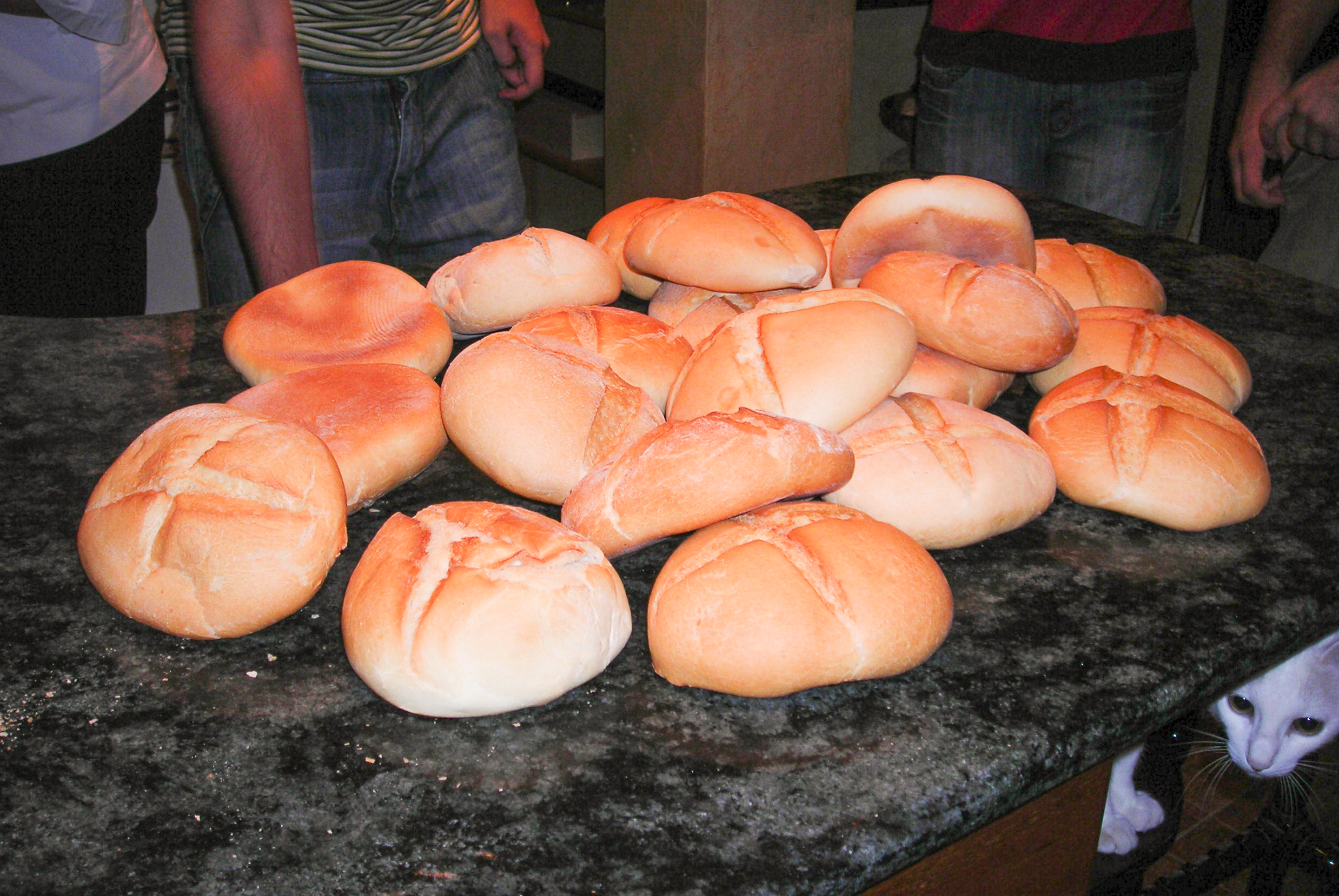 la pitanza es un panecillo caracteristico de Librilla (Murcia, España)